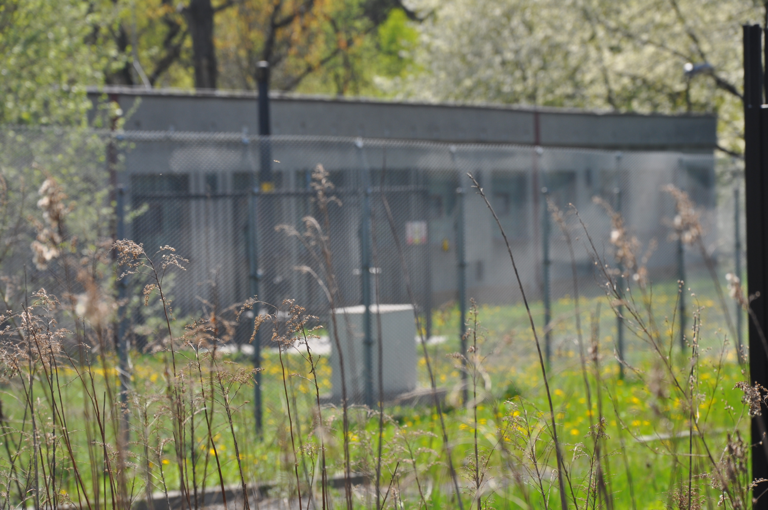 Pohled na místo kutací jámy Zwierzina číslo 6, Slezská Ostrava